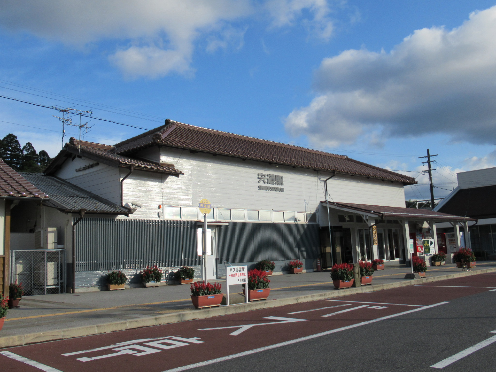 宍道駅 2017年リニューアル後